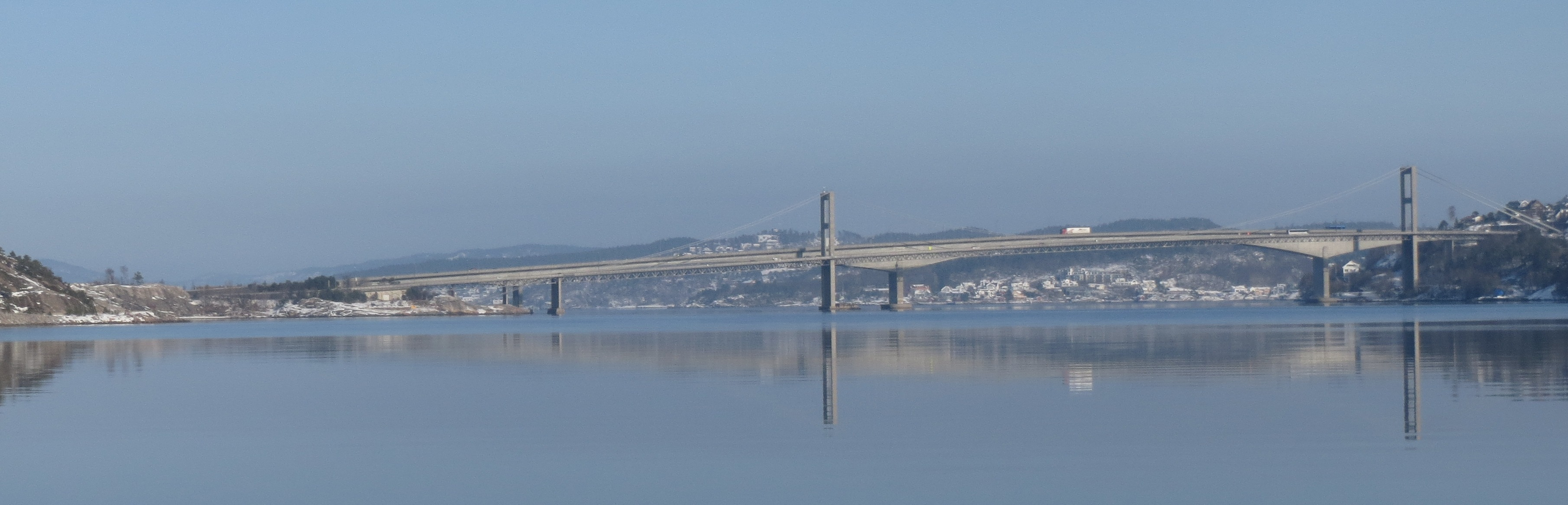 Varoddbrua i fenruar 2017, sett fra sør